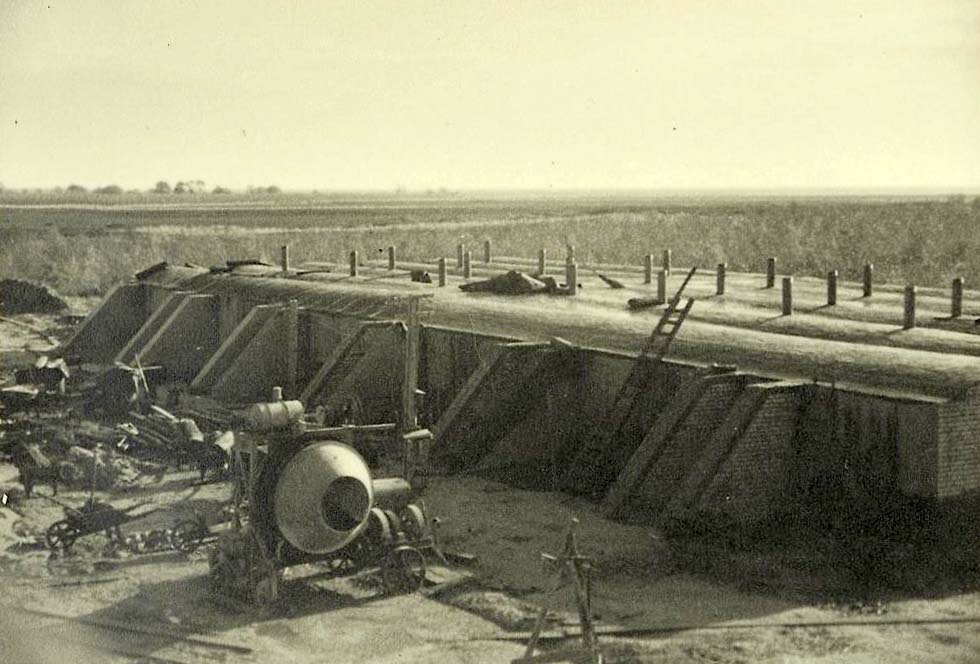 Westerbork, Holland, Construction of a shelter on the camp grounds. FA29/98